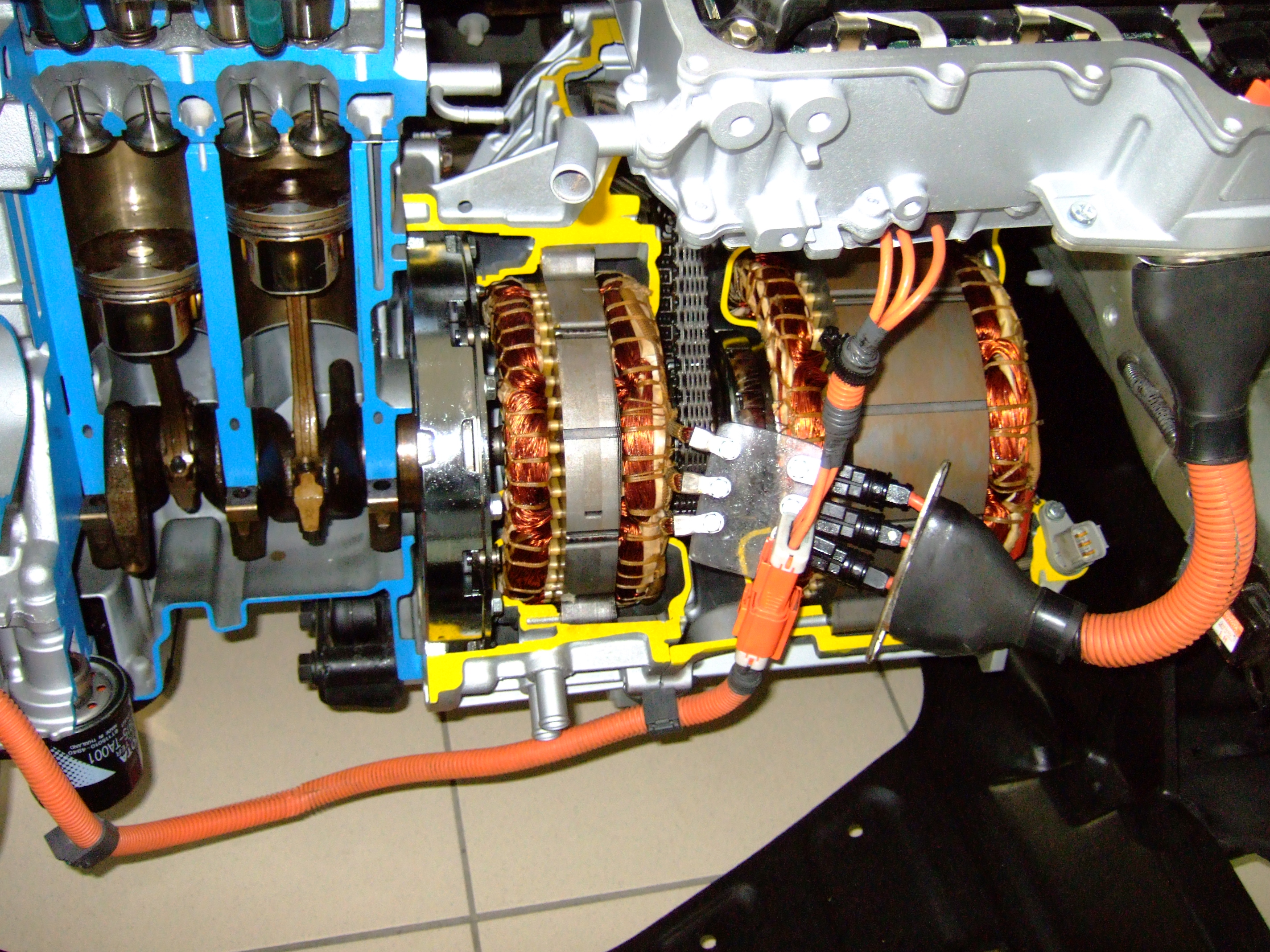 Schnitt durch den Antrieb des Prius 2